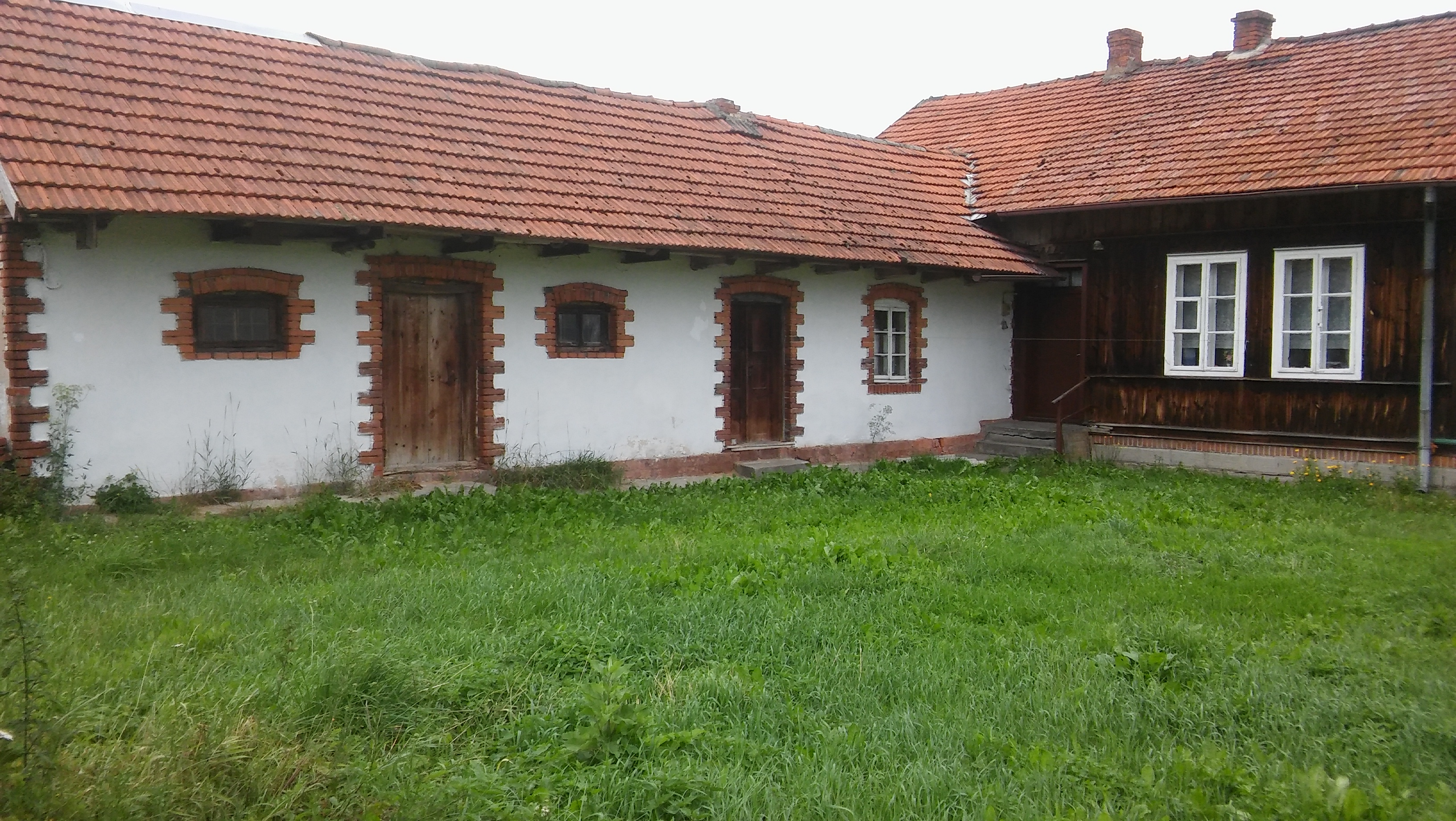 Przełaj - tradycyjne zabudowania wiejskie